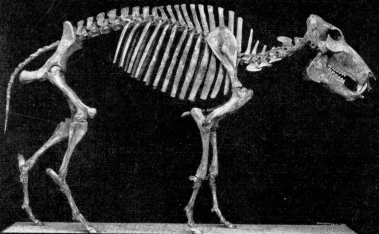 Platygonus leptorhinus skeleton